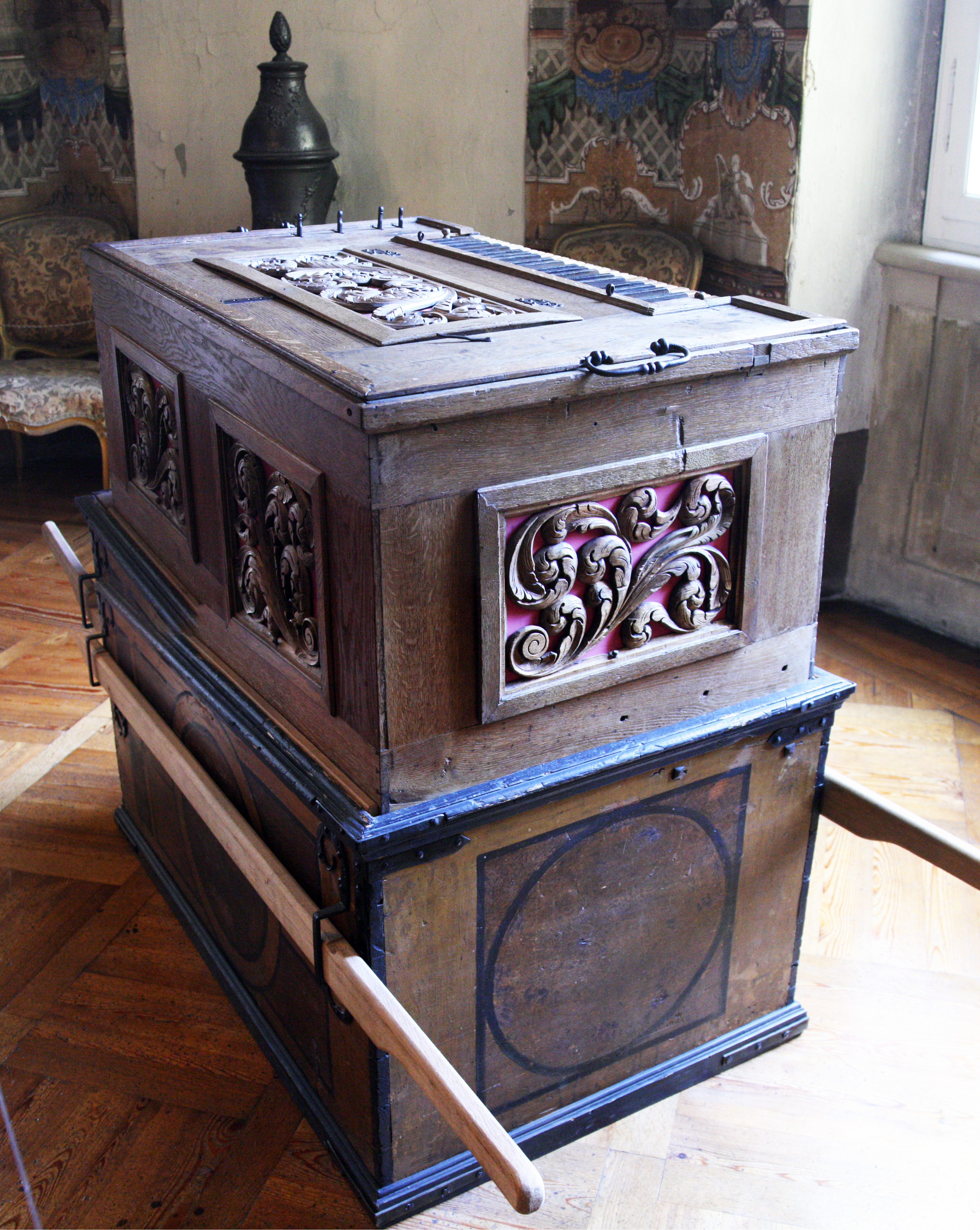 Transportable Feldorgel von 1712 im Inventar des Residenzschloss Ludwigsburg